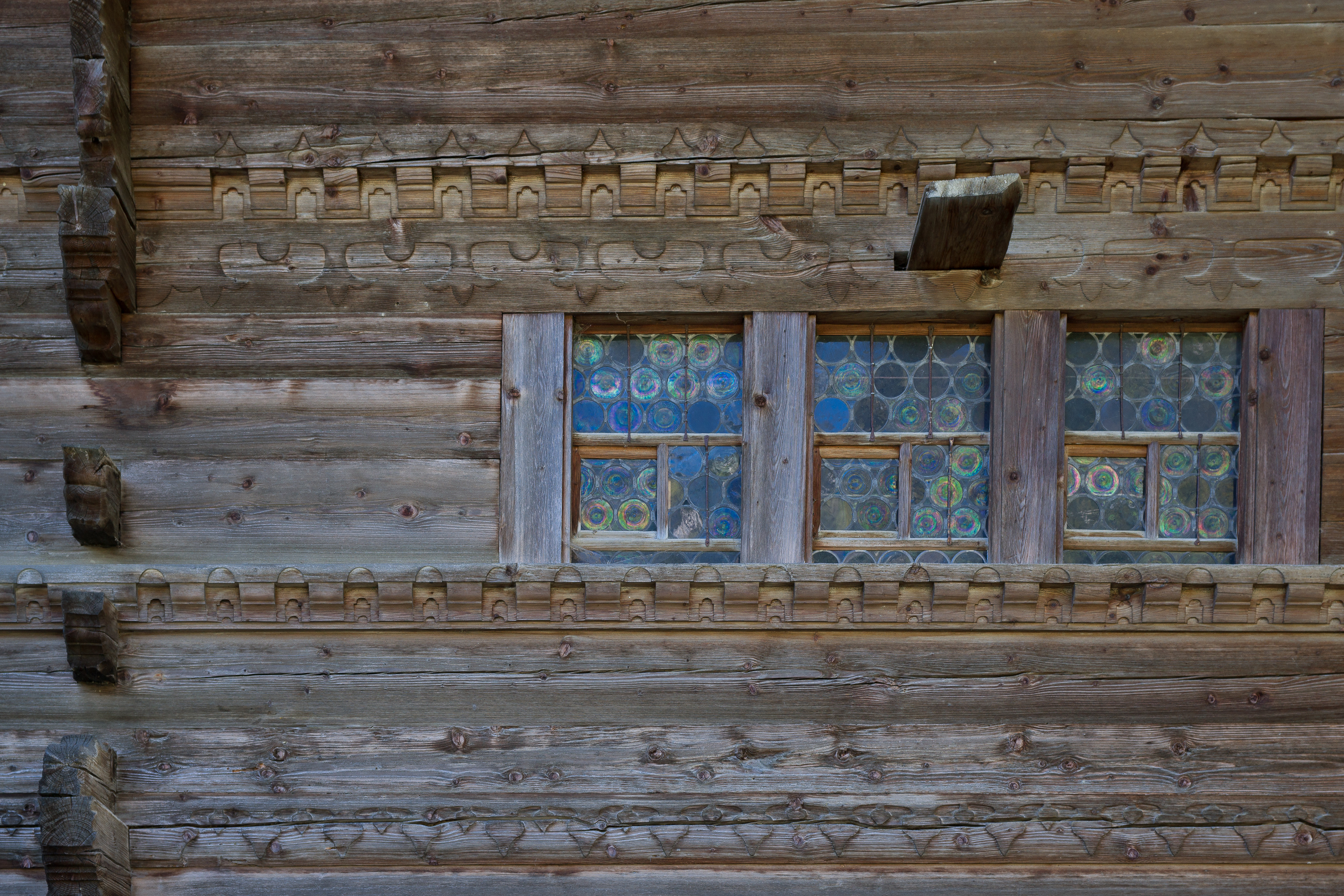 Vennerhaus, Büel 201, Fassadendetail, Butzenscheiben